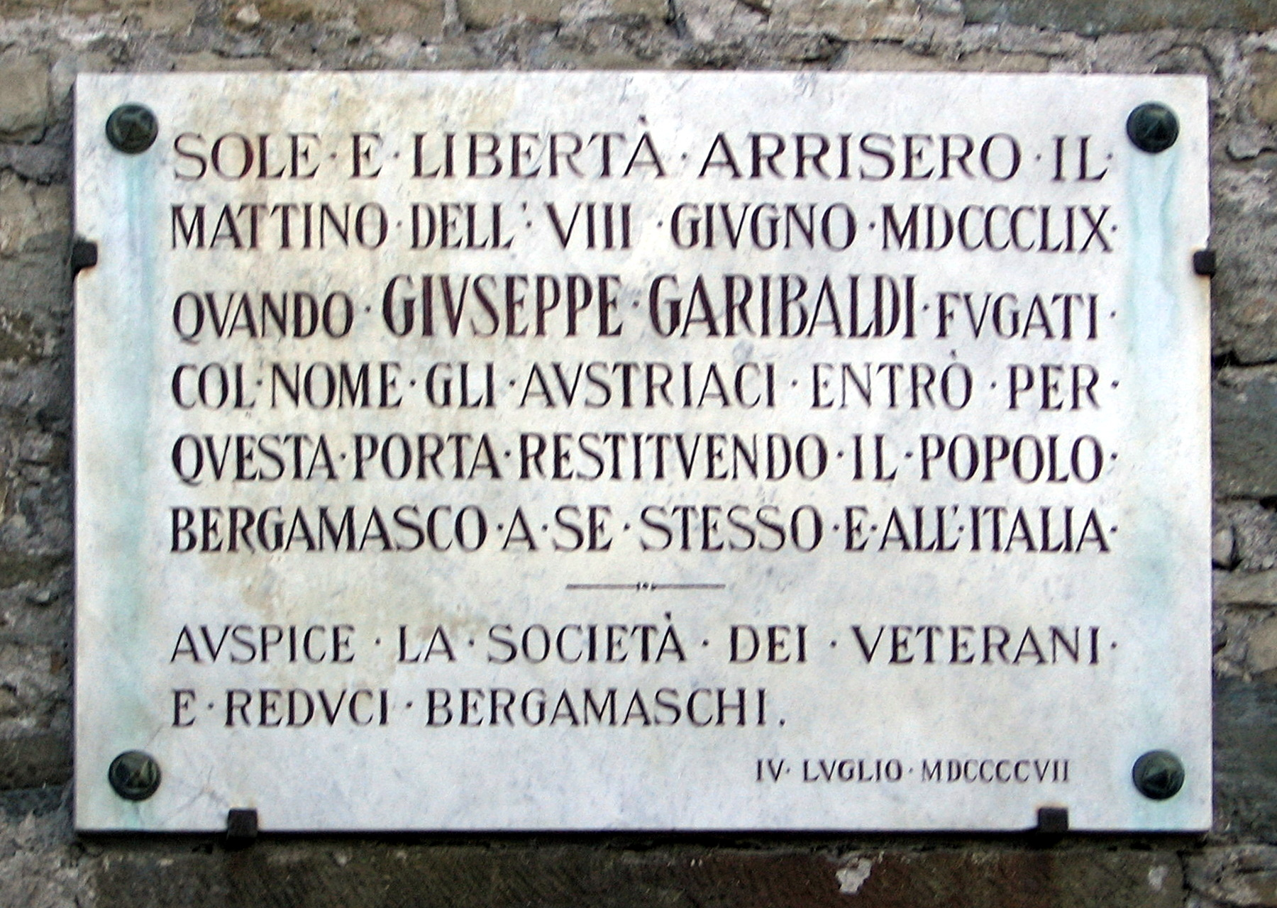 Dettaglio della porta San Lorenzo (detta anche Porta Garibaldi), Mura Venete, Bergamo, Italy